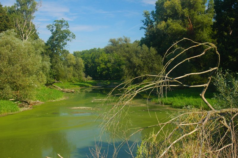 Morava river, abandoned meander in Slovakia